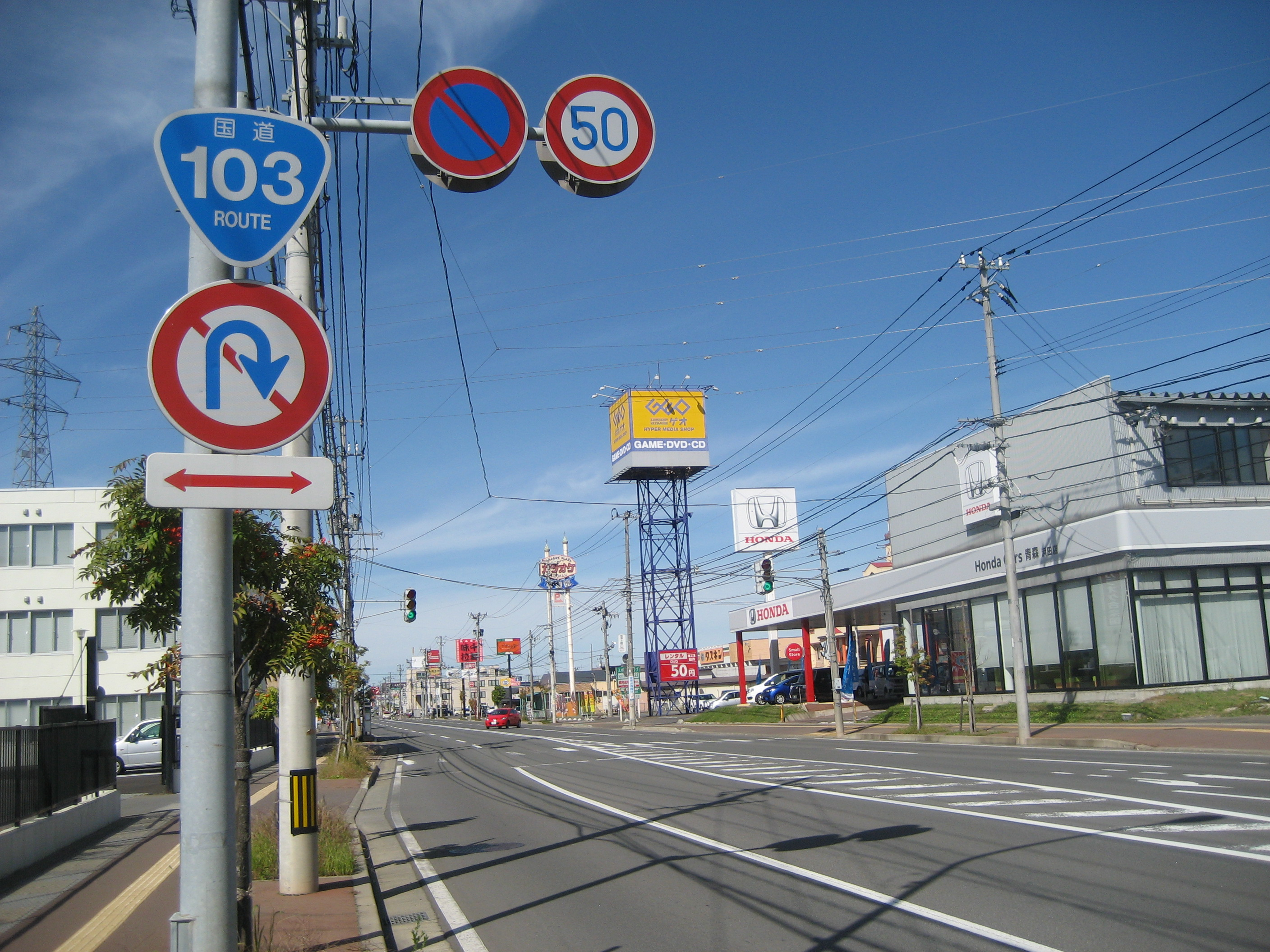 国道103号線青森県青森市浜田付近